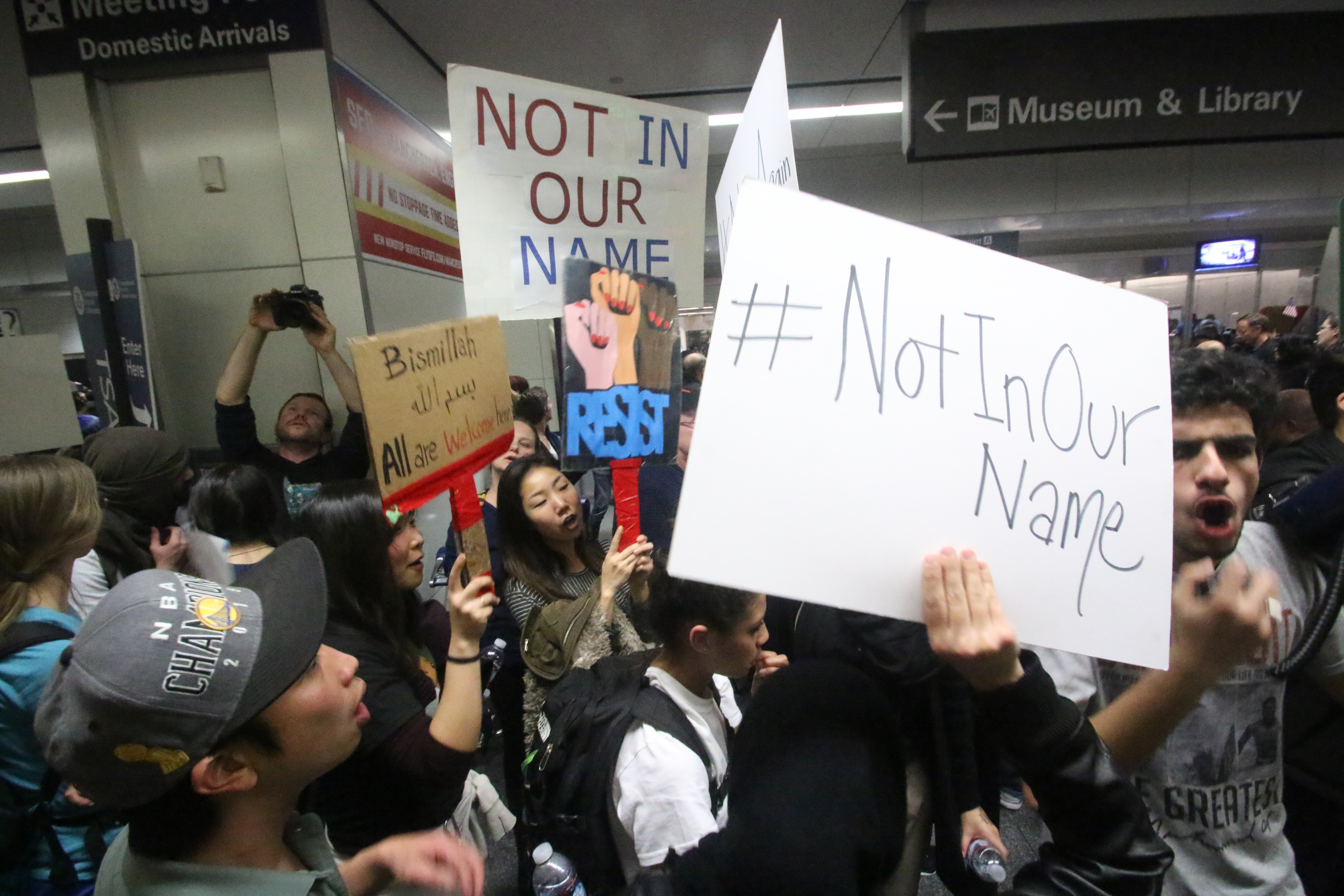 SFO Muslim Ban Protest